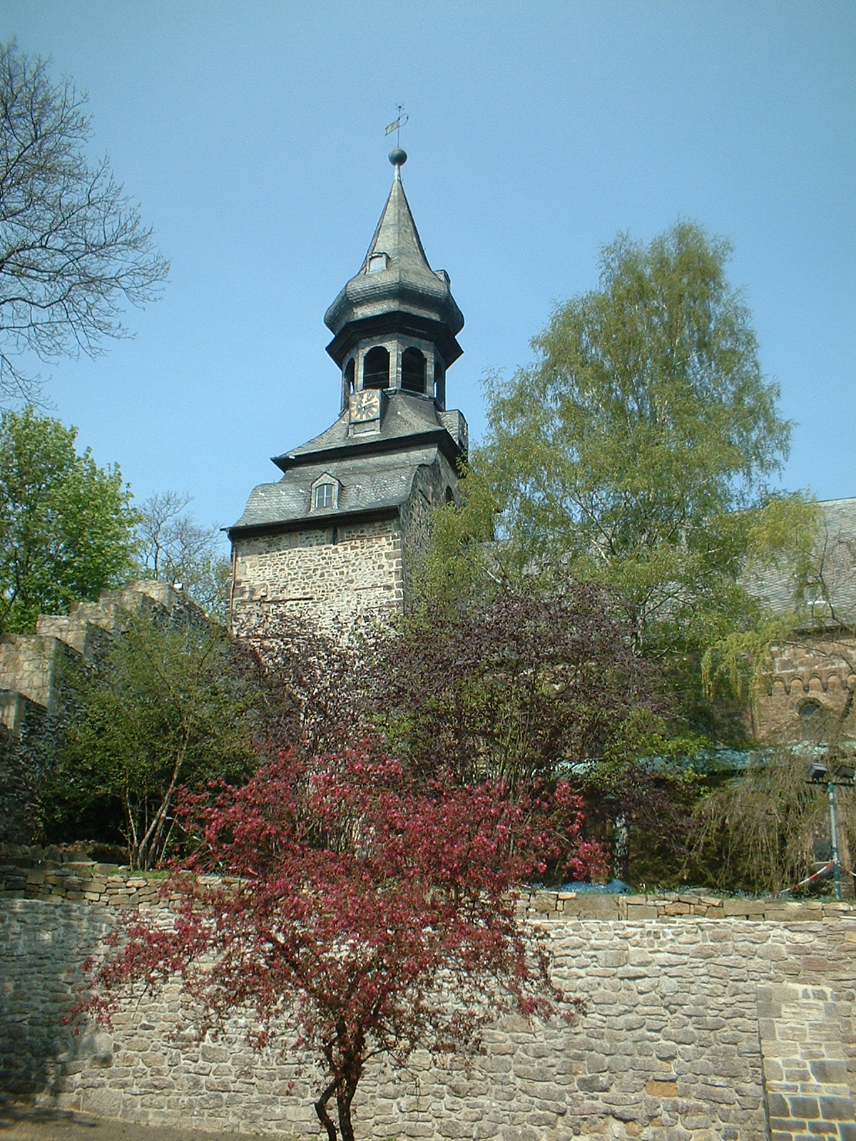 St. Peter und Paul auf dem Frankenberge (Goslar)